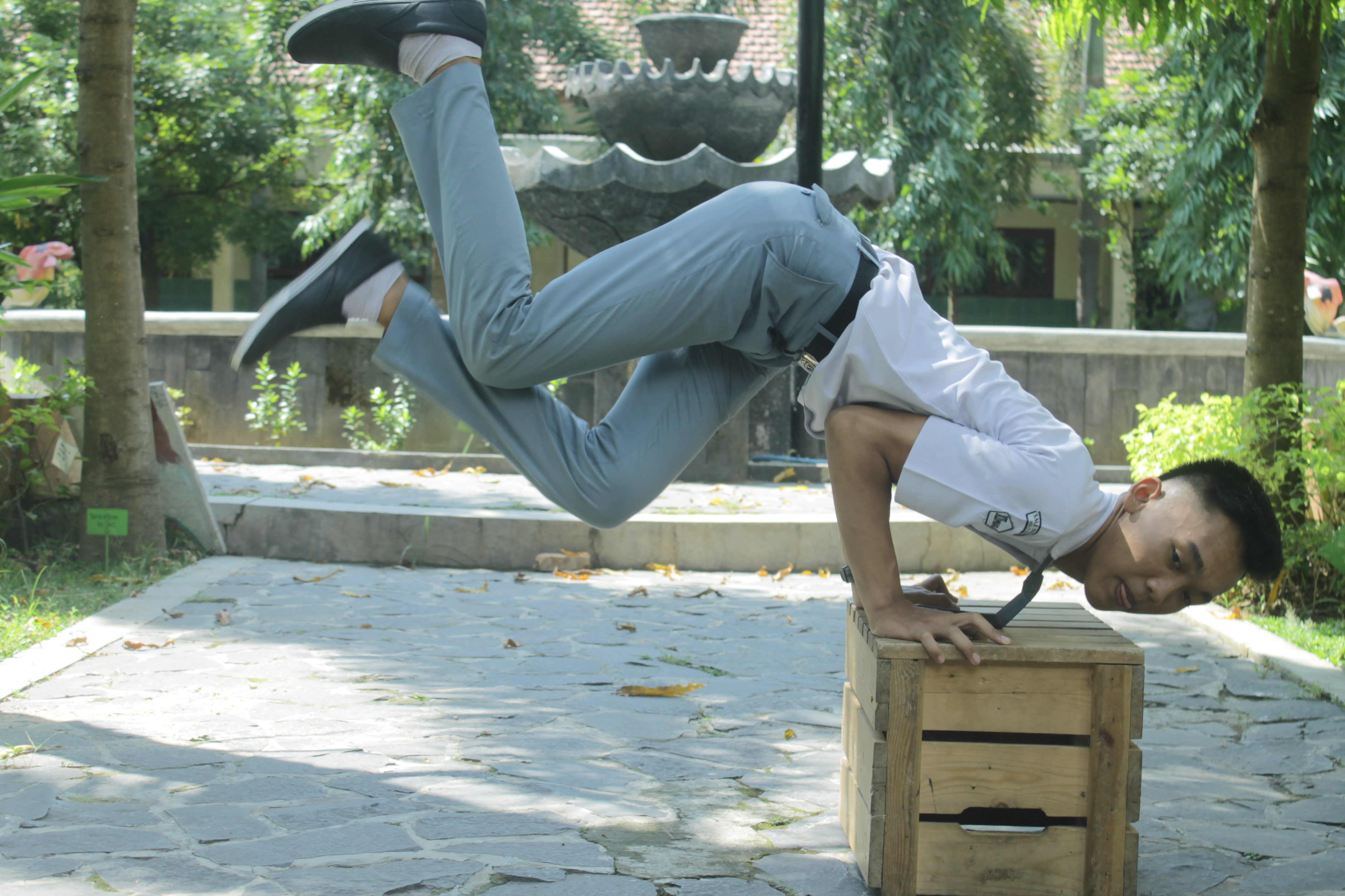 Salah foto saat sedang bersekolah di SMAN 1 Maospati